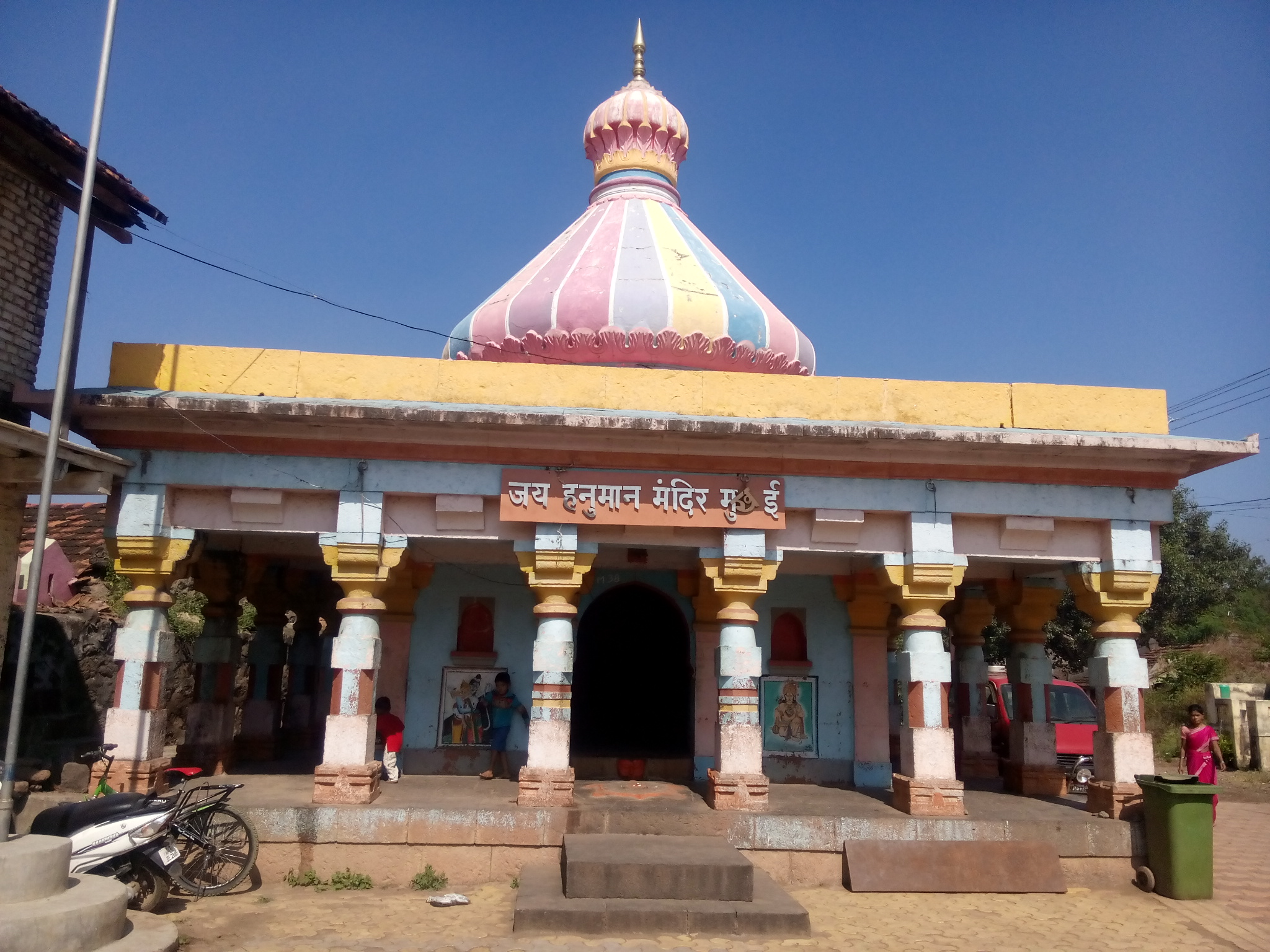 photo